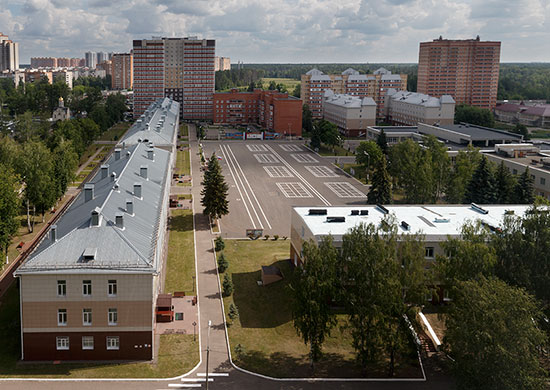 Военная академия Ракетных войск стратегического назначения имени Петра Великого